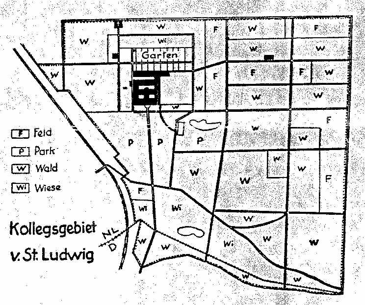 Lageplan Kolleg St. Ludwig, Vlodrop, Niederlande (Ausrichtung der Skizze von Südost nach Nordwest)